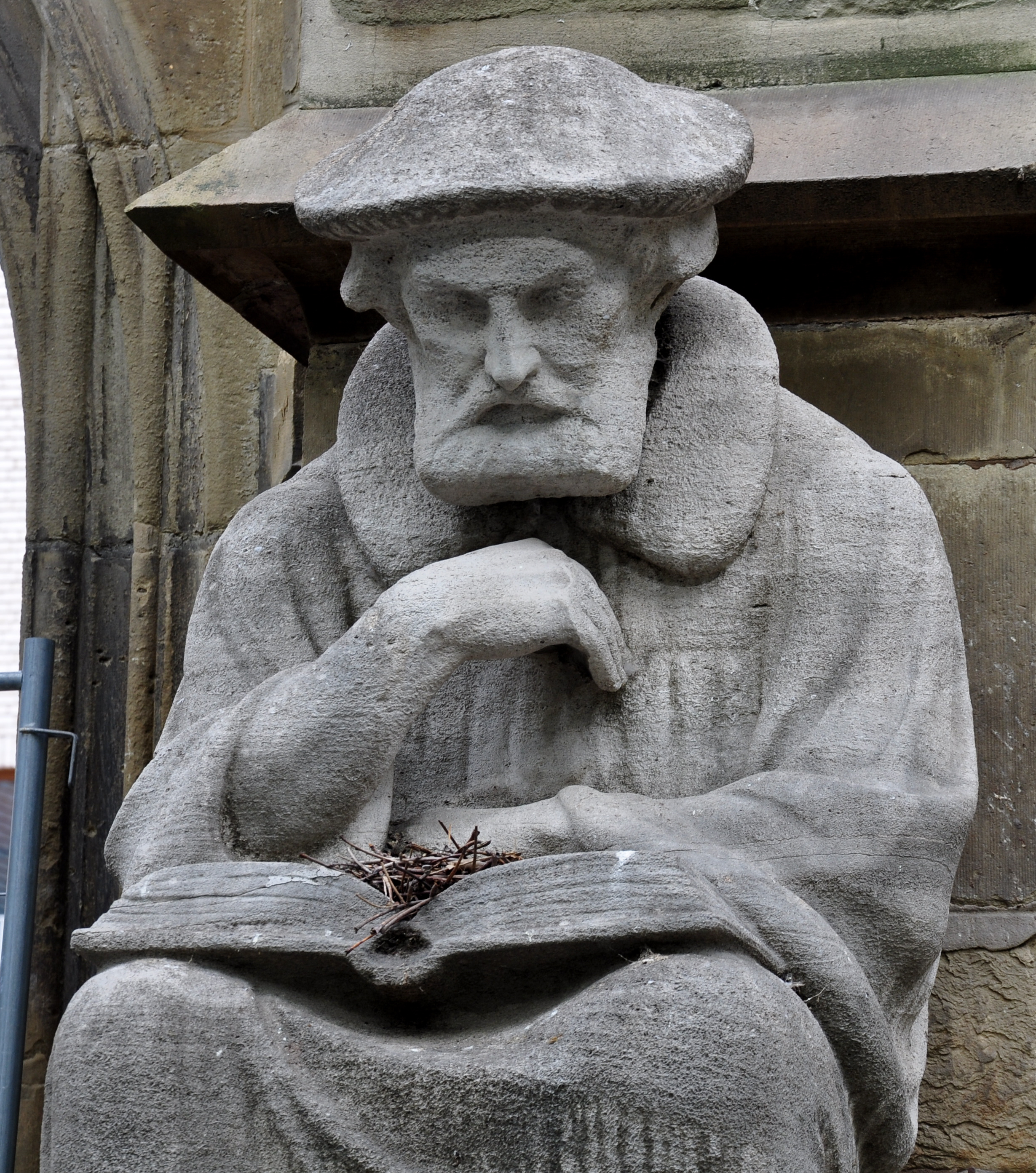 Stuttgart, Reformationsdenkmal an der Hospitalkirche, Bildhauer: Jakob Brüllmann, 1917; Detail: Johannes Brenz